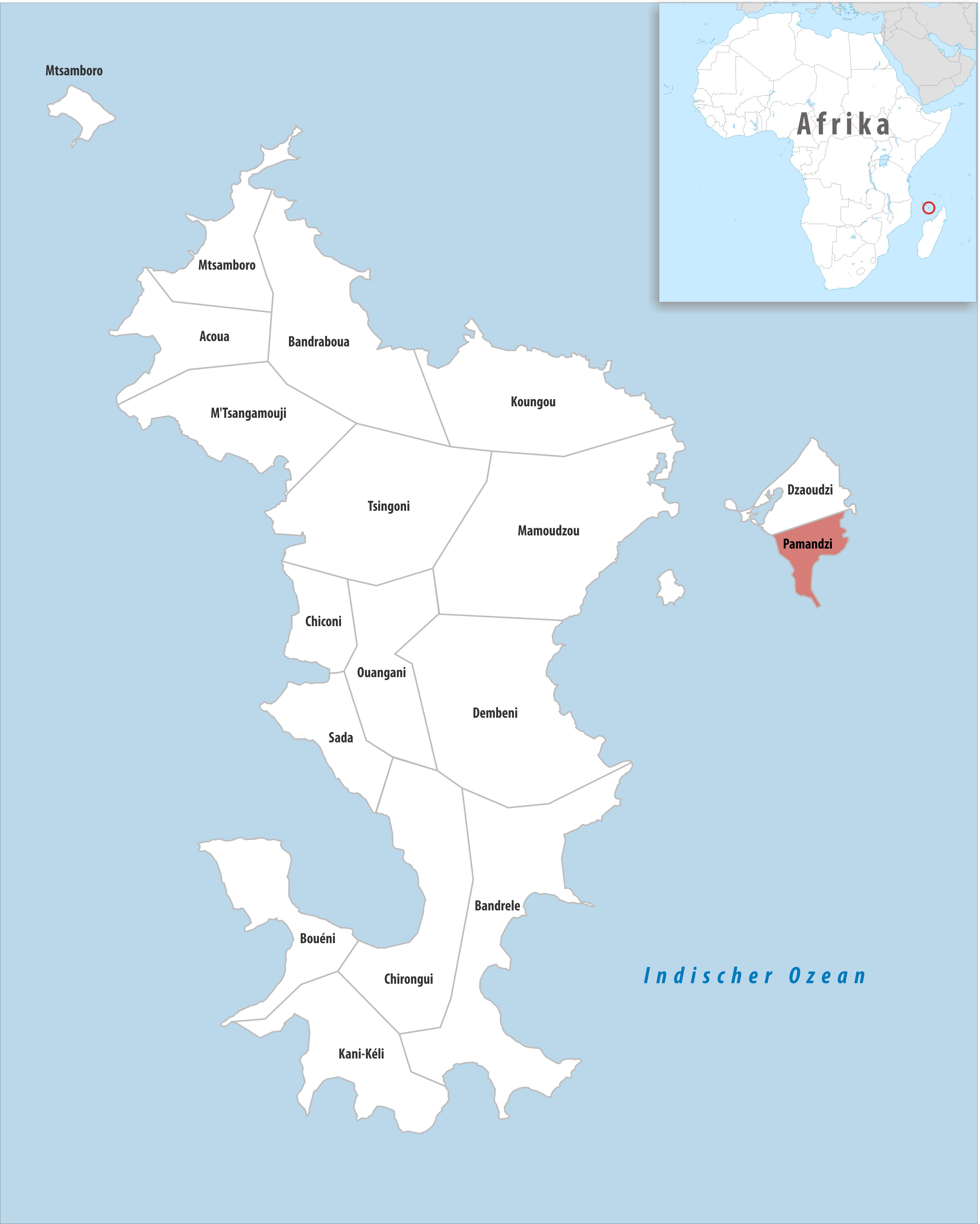 Lage der Gemeinde Pamandzi